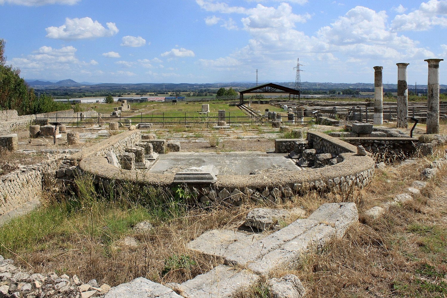 Lucus Feroniae (Italie). Vue du site archéologique, vue de l'aedes augusti avec le forum en arrière plan.